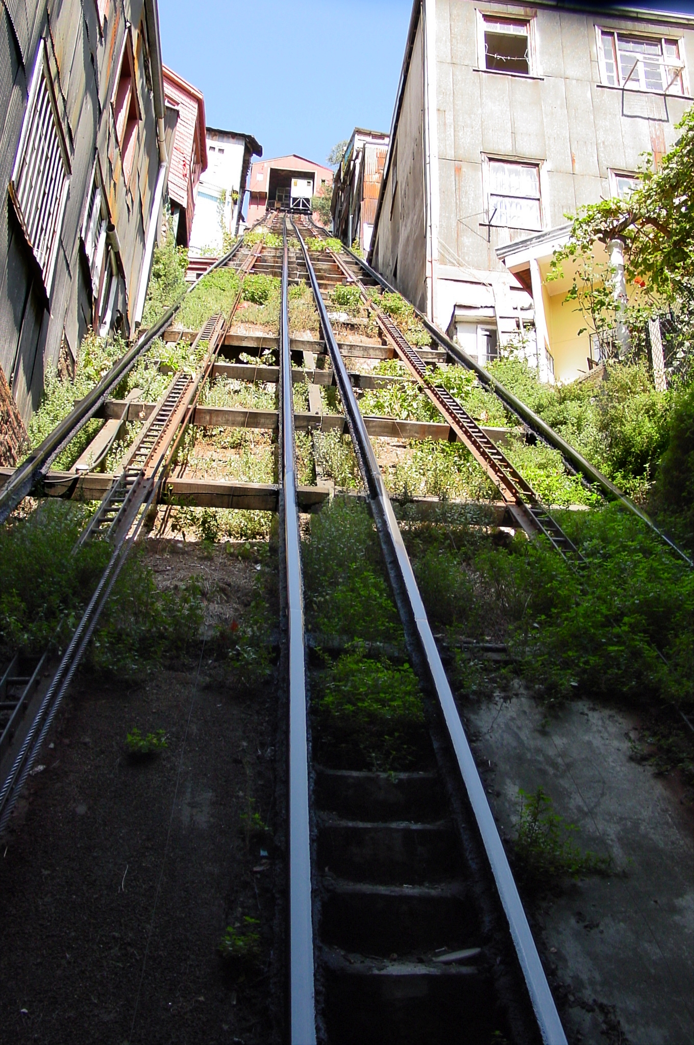 Acensor Monjas vu de bas en haut